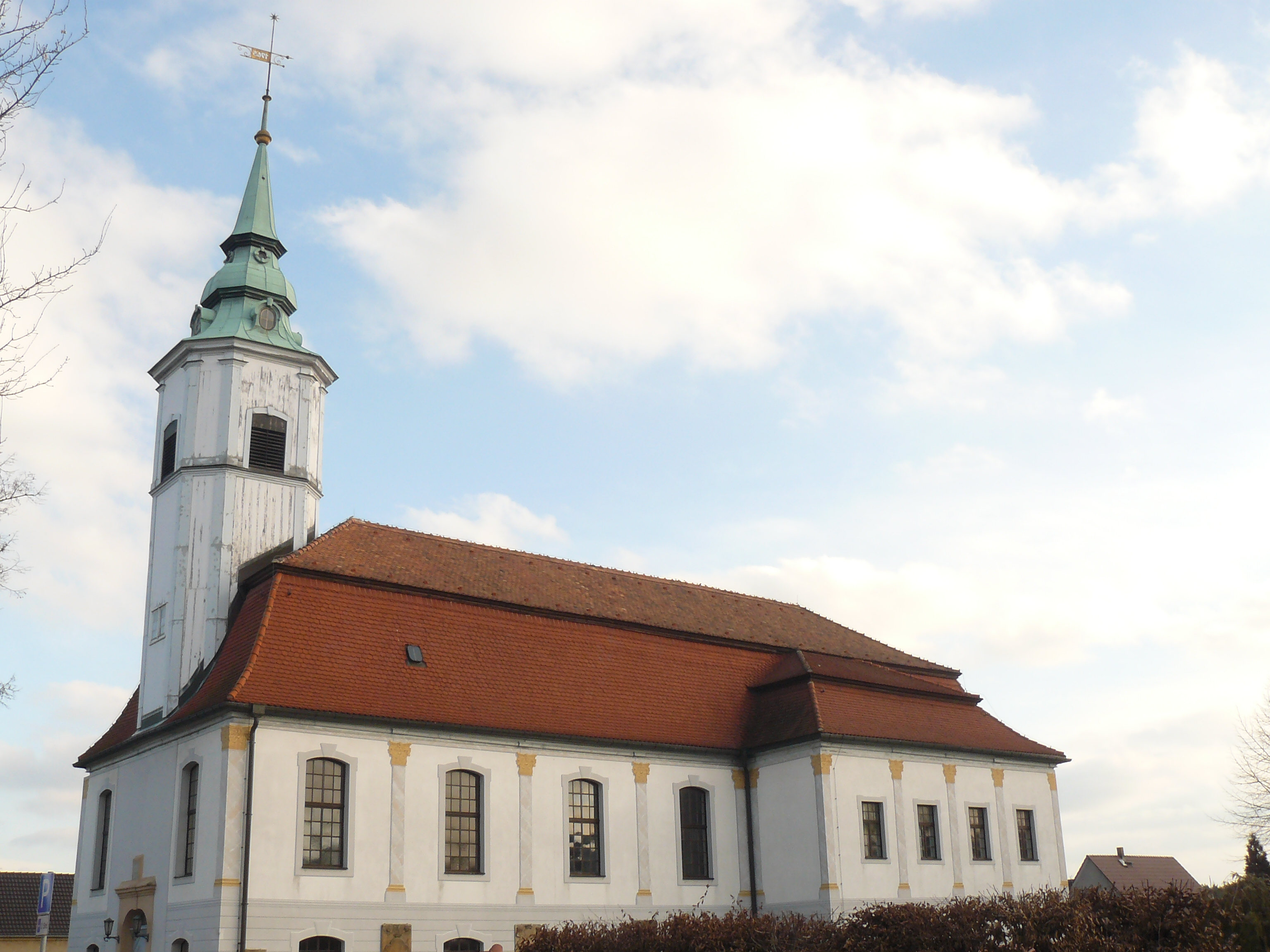 Evangelische Kirche in Uhyst an der Spree (Landkreis Görlitz)